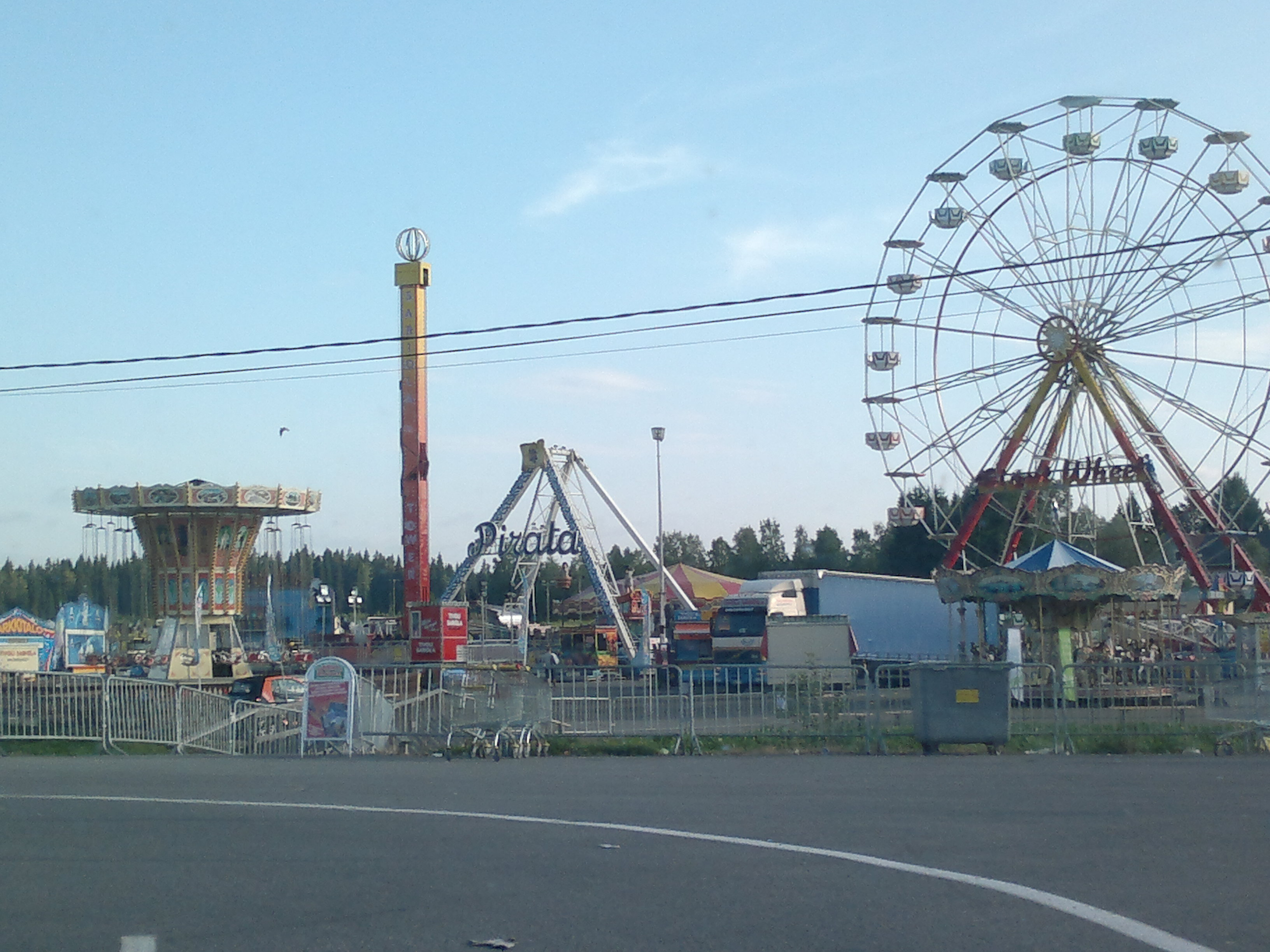 Miljoona Tivoli Tuurissa heinäkuussa 2013.